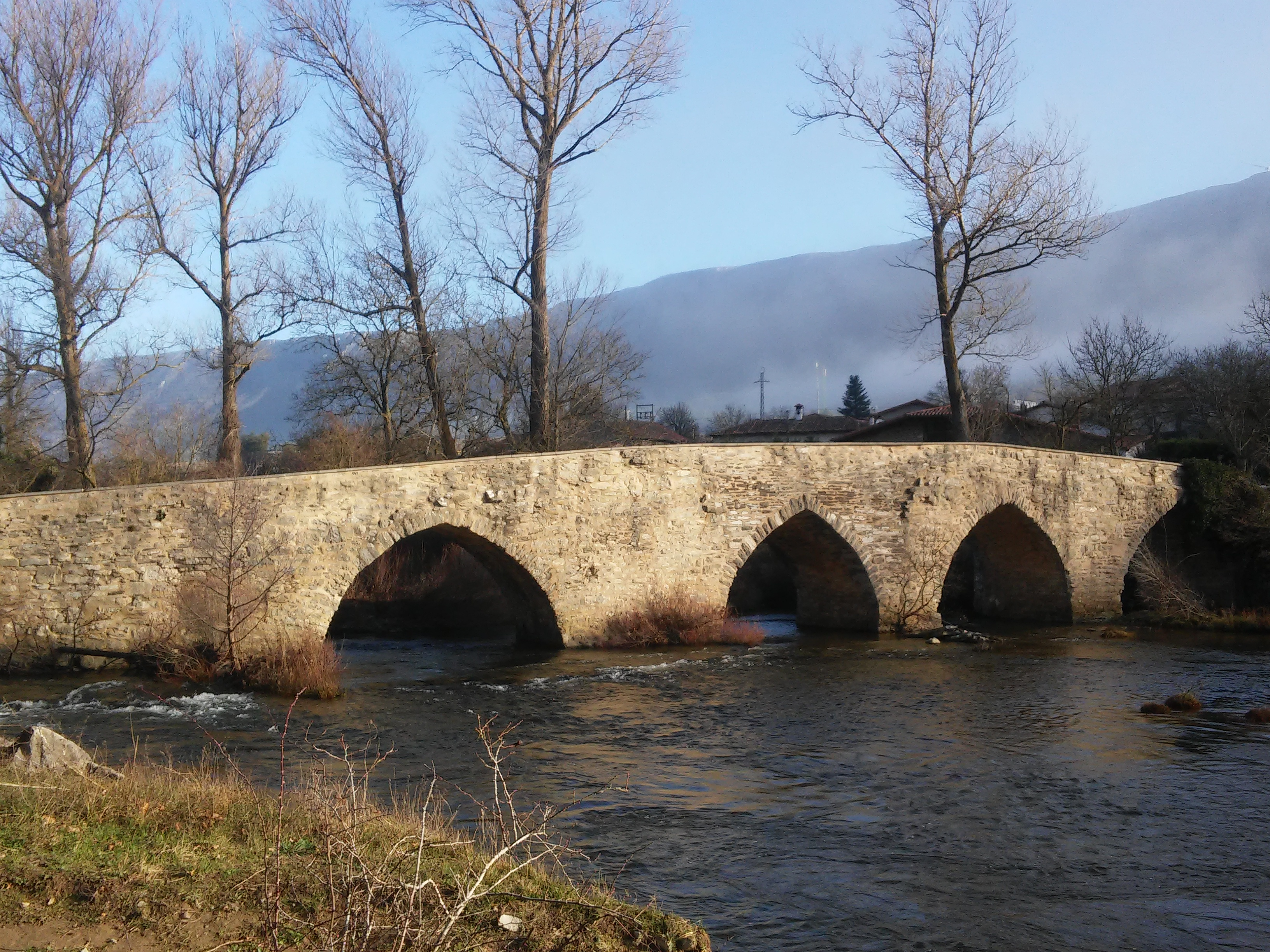 Aprikanoko zubia (Kuartango, Araba)